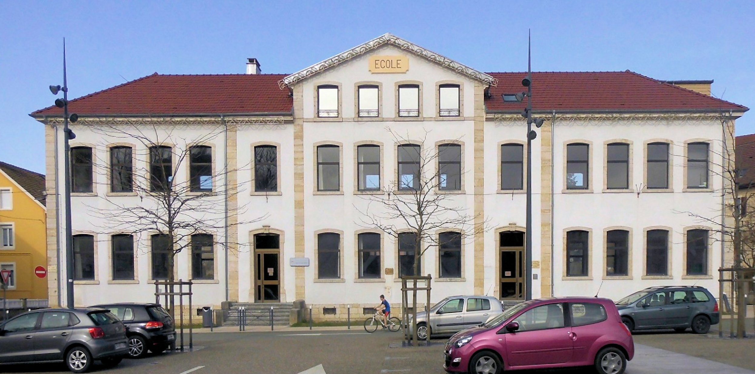 L'école primaire et l'école de musique à Beaucourt